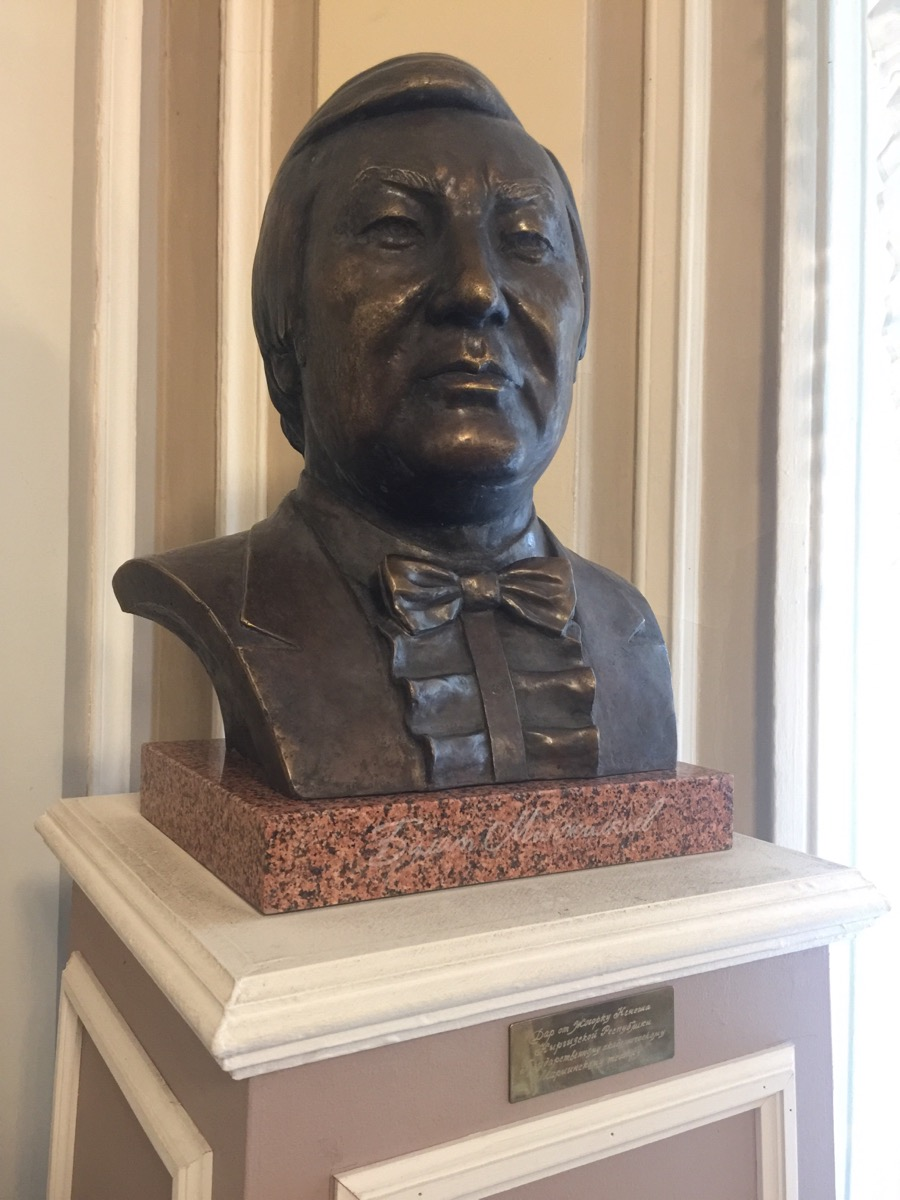 Бюст Булата Минжелкиева в Мариинском театра в Санкт-Петербурге. Надпись на дарственной табличе: "Дар от Жогорку Кенеша Кыргызской Республики Государственному академическому Мариинскому театру"